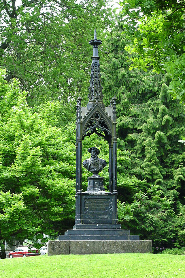 Gustav Vasa Memorial in Kalmar (Schlosspark)